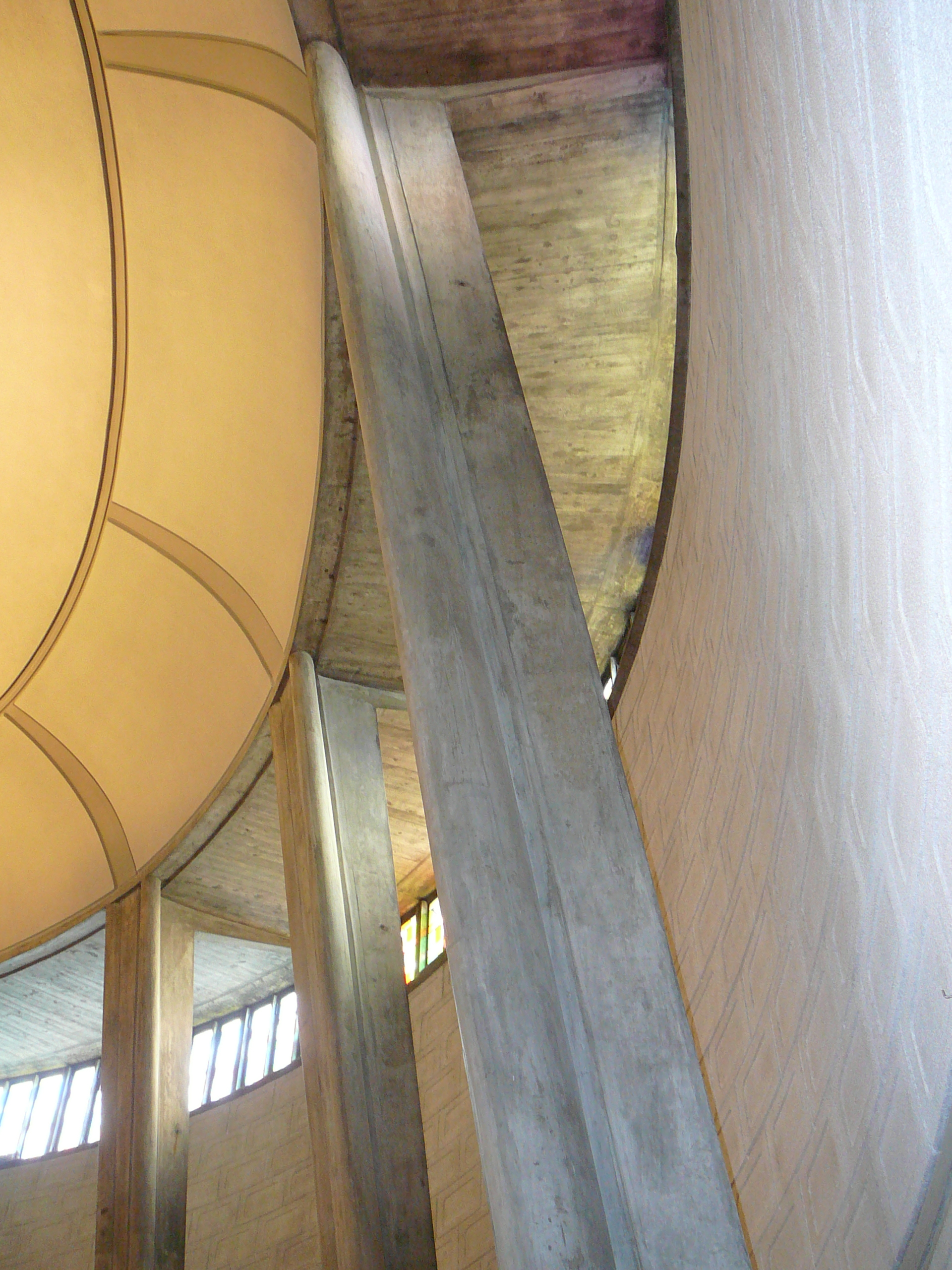 Römisch-katholische Kirche St. Felix und Regula, Zürich-Hard, Pfeiler